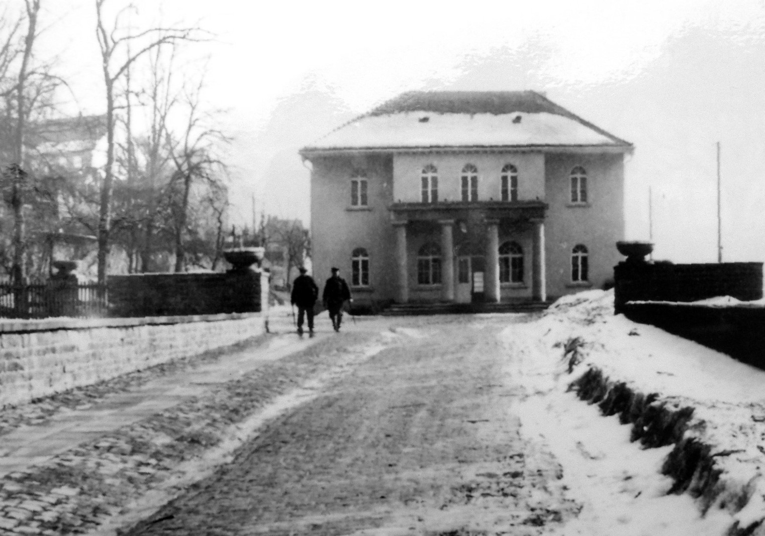 Der Bahnhof "Carlshafen (linkes Ufer)" der ehemaligen Carlsbahn Quelle: Schaukasten Marie-Durant-Schule Bad Karlshafen Fotograf: unbekannt Datum: vor 1900